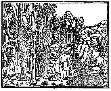 Hypnerotomachia Poliphili